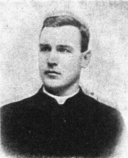 Österreichischer Politiker, Reichsratswahl 1907, Name siehe Dateiname